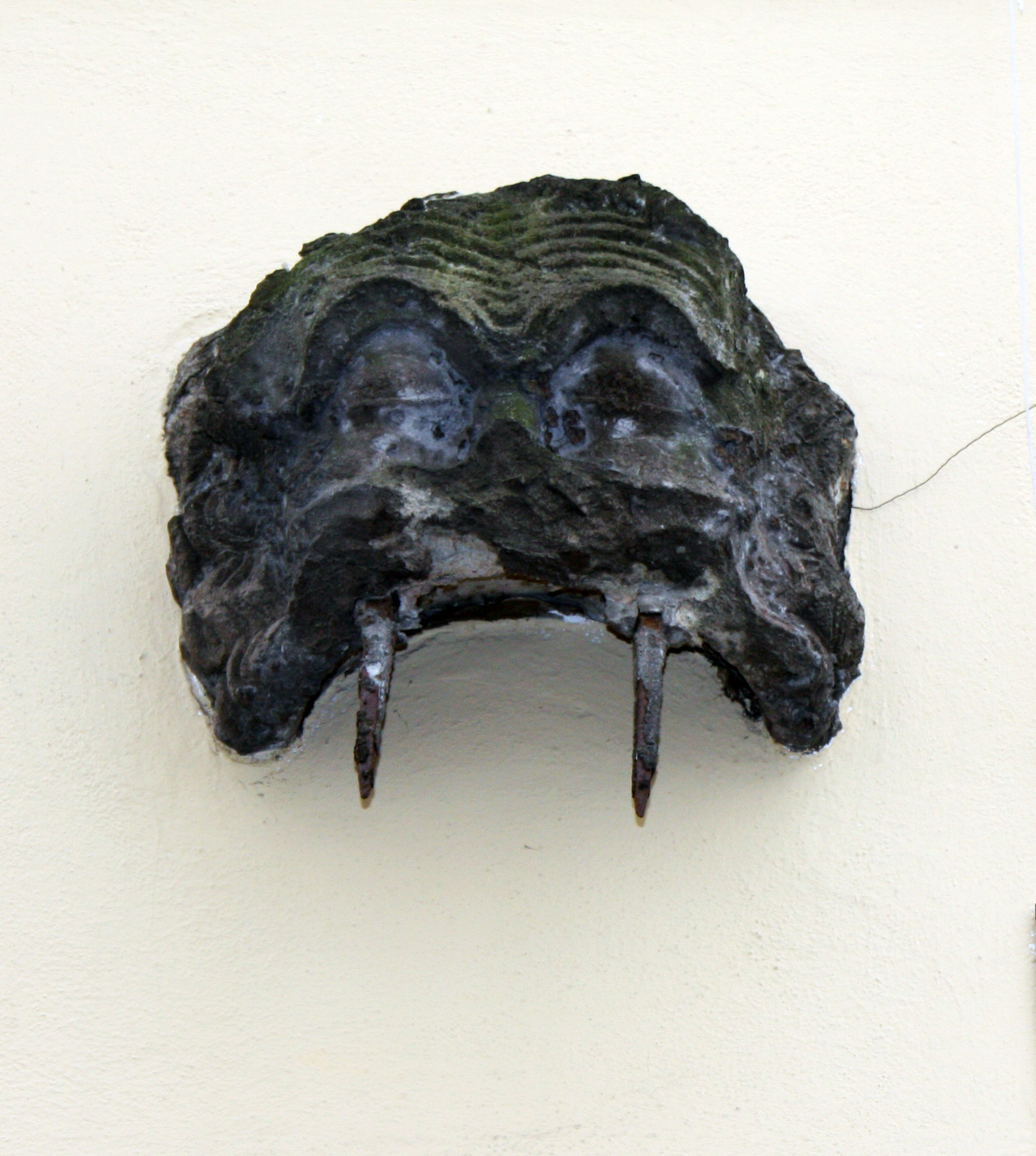 Köln, Altstadt, Auf den Rothenberg. Detail